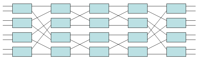 8x8 Benes network